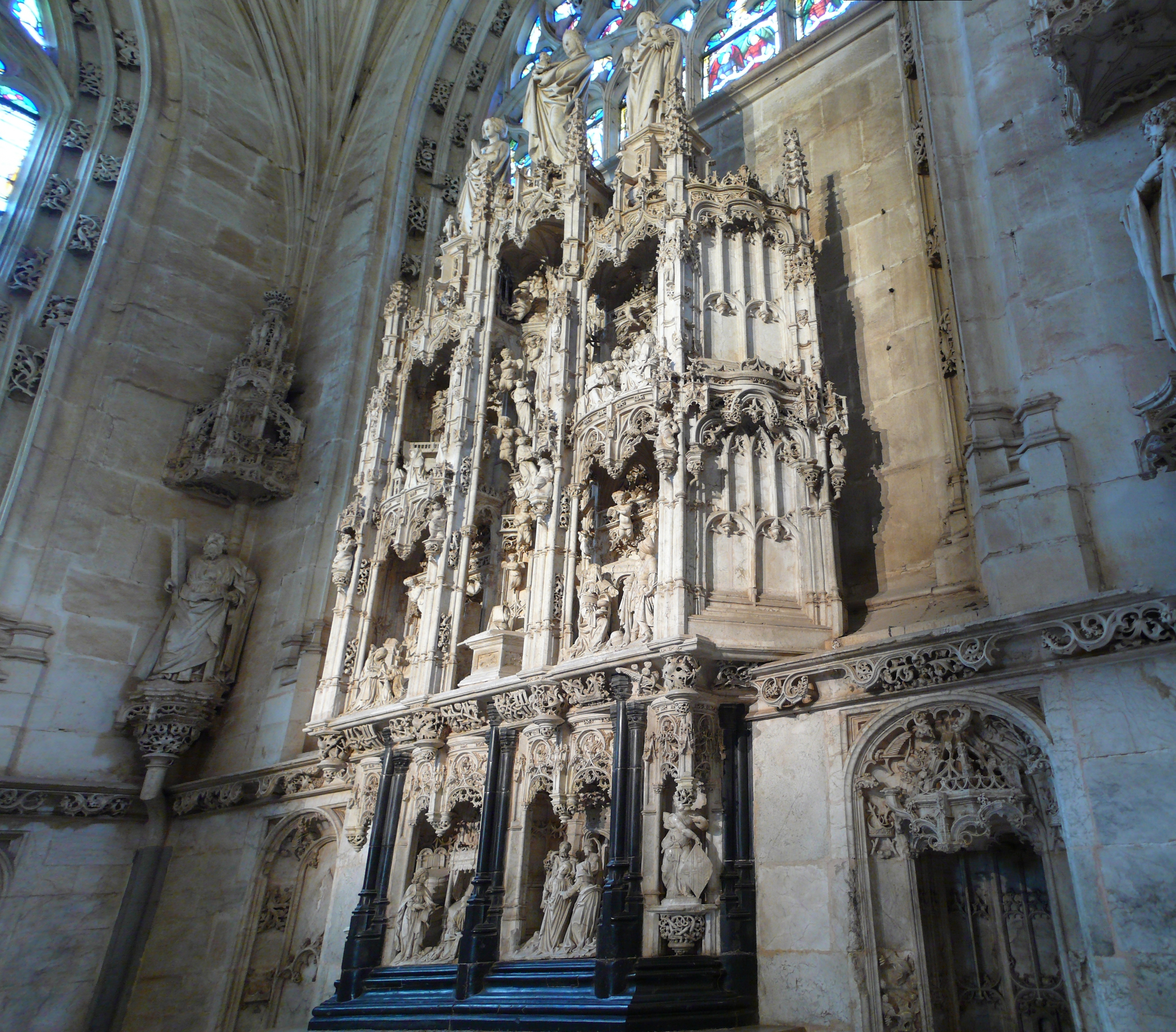 Église de Brou (Bourg-en-Bresse, Ain, France); retable en albâtre de la chapelle de la Vierge.